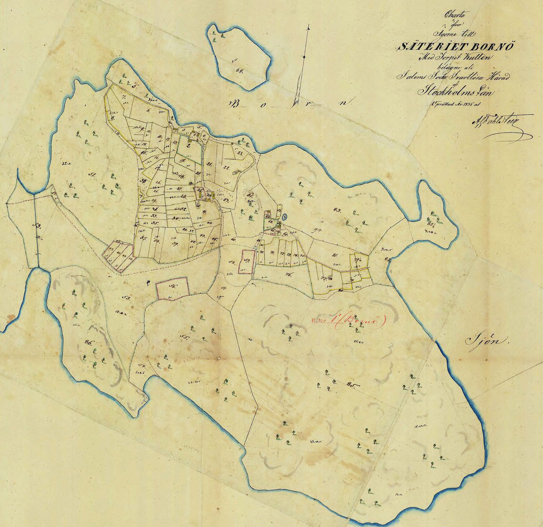 Karta över Säteriet Bornö, Salems socken